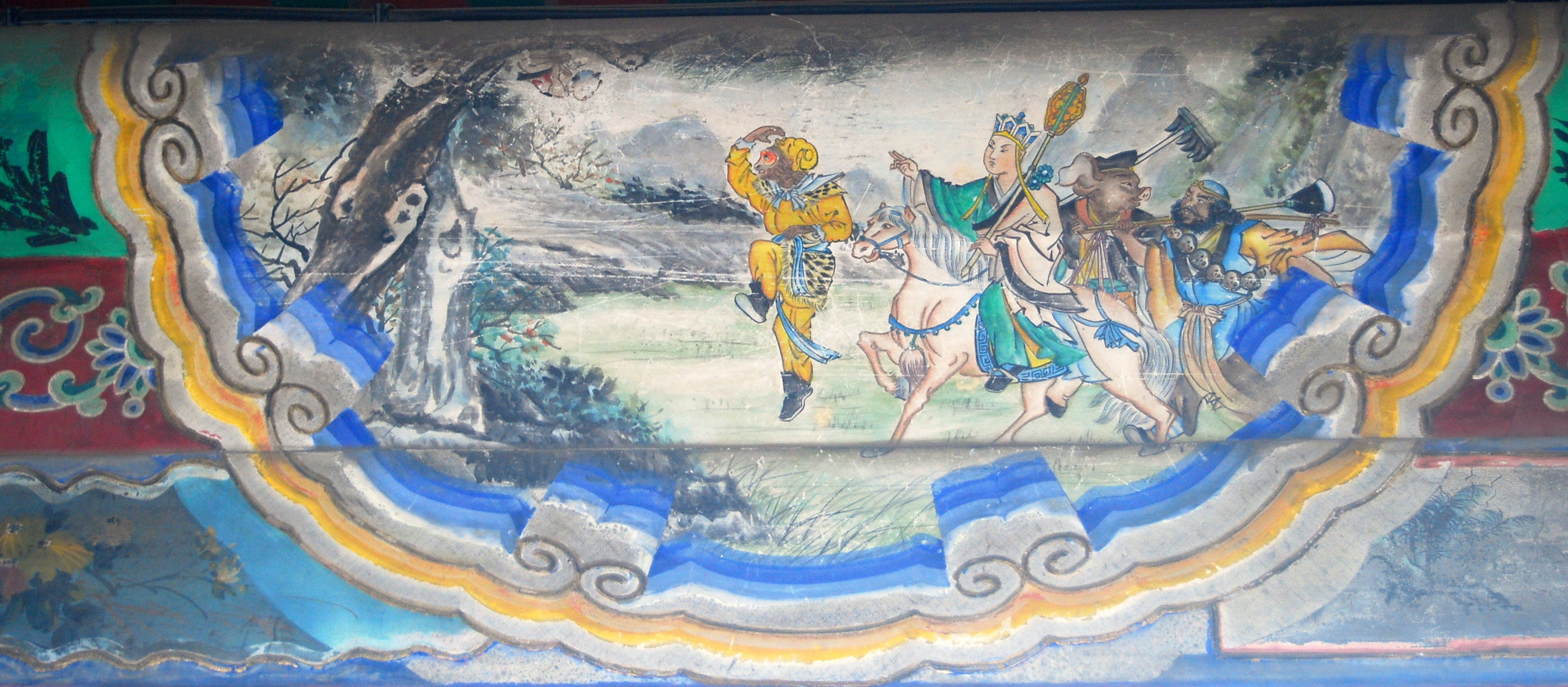 颐和园长廊上的彩绘：路遇红孩儿